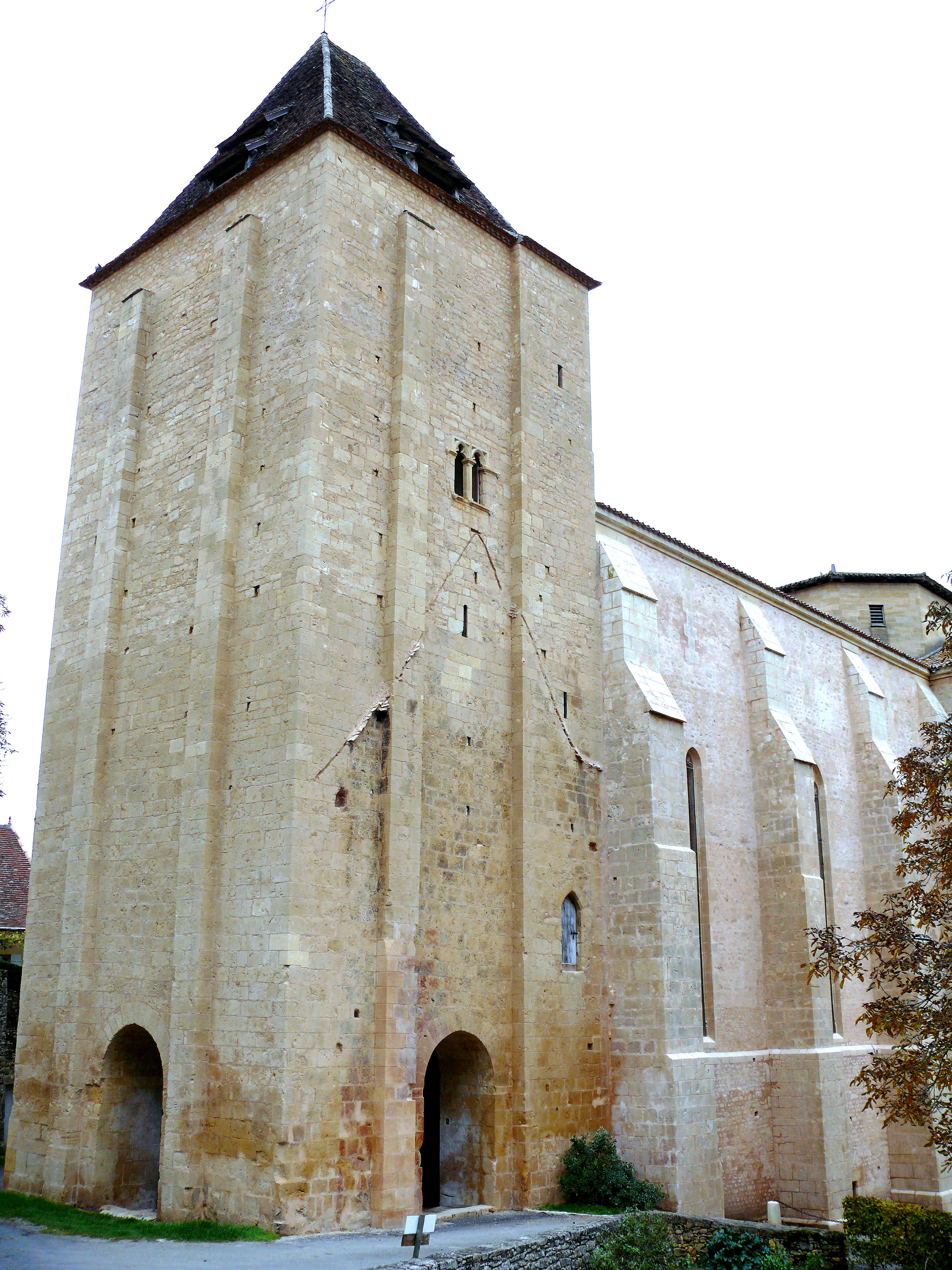 Paunat - Église Saint-Martial - Clocher-porche